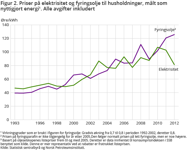 Statistisk sentralbyrå.